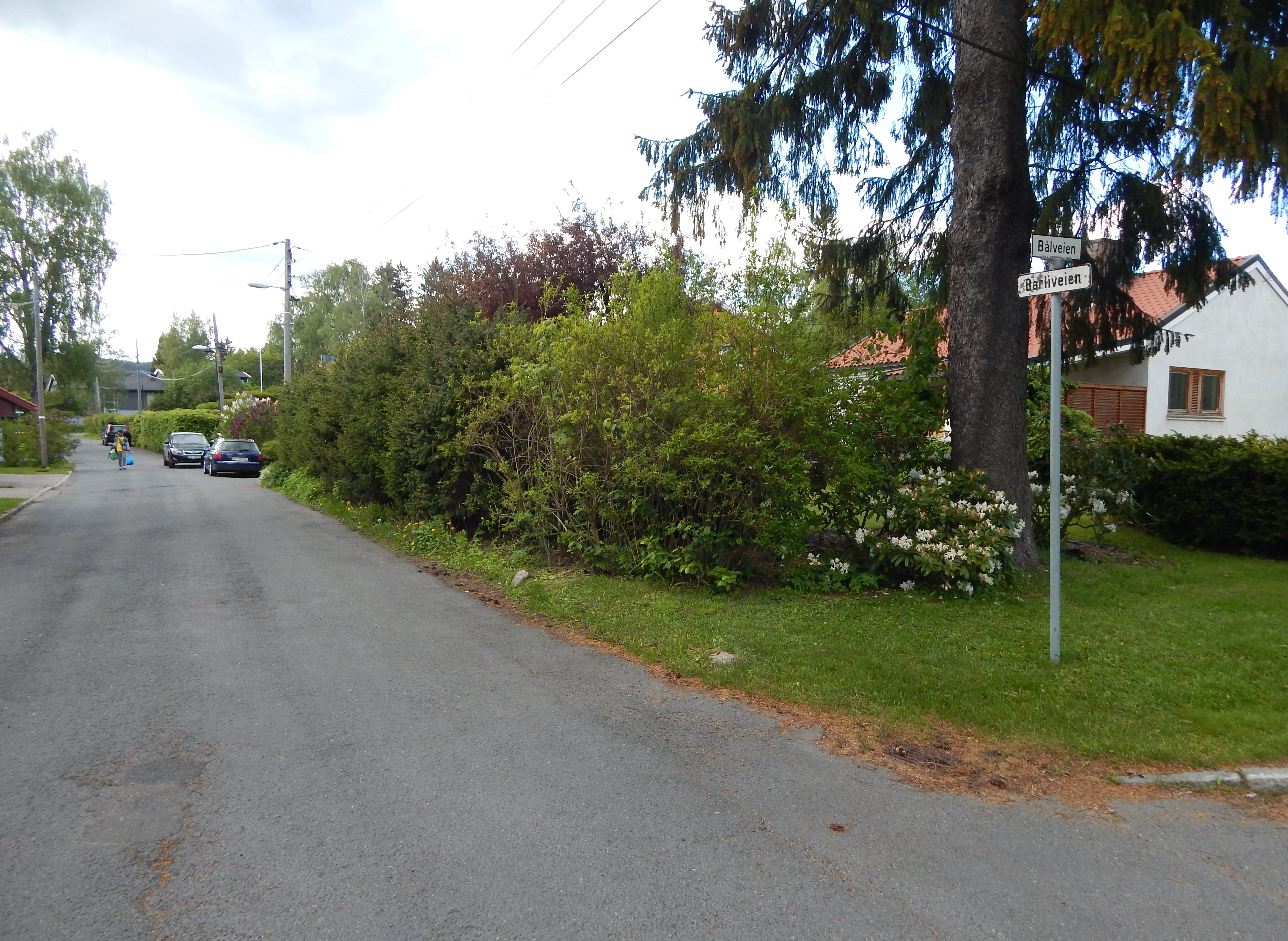 Barliveien på Nordberg i Oslo